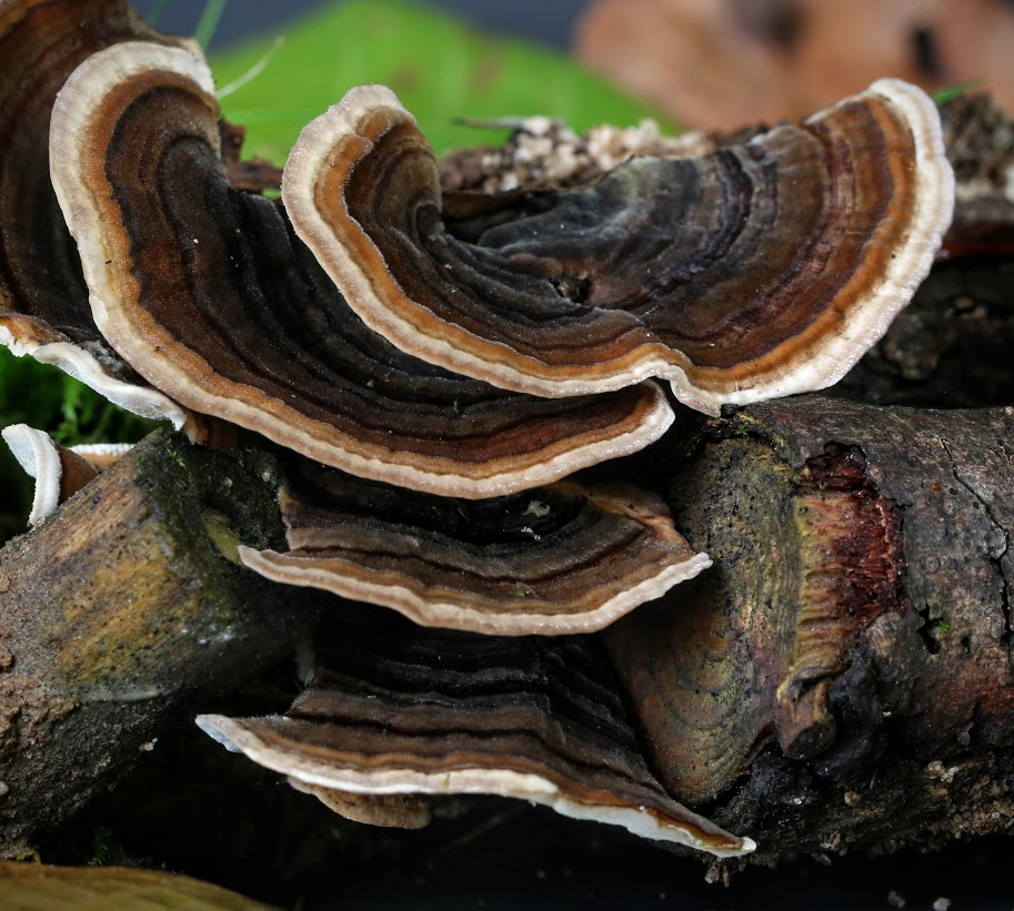 Schmetterlingsporling (Coriolus versicolor) auf Totholz, ungenießbar